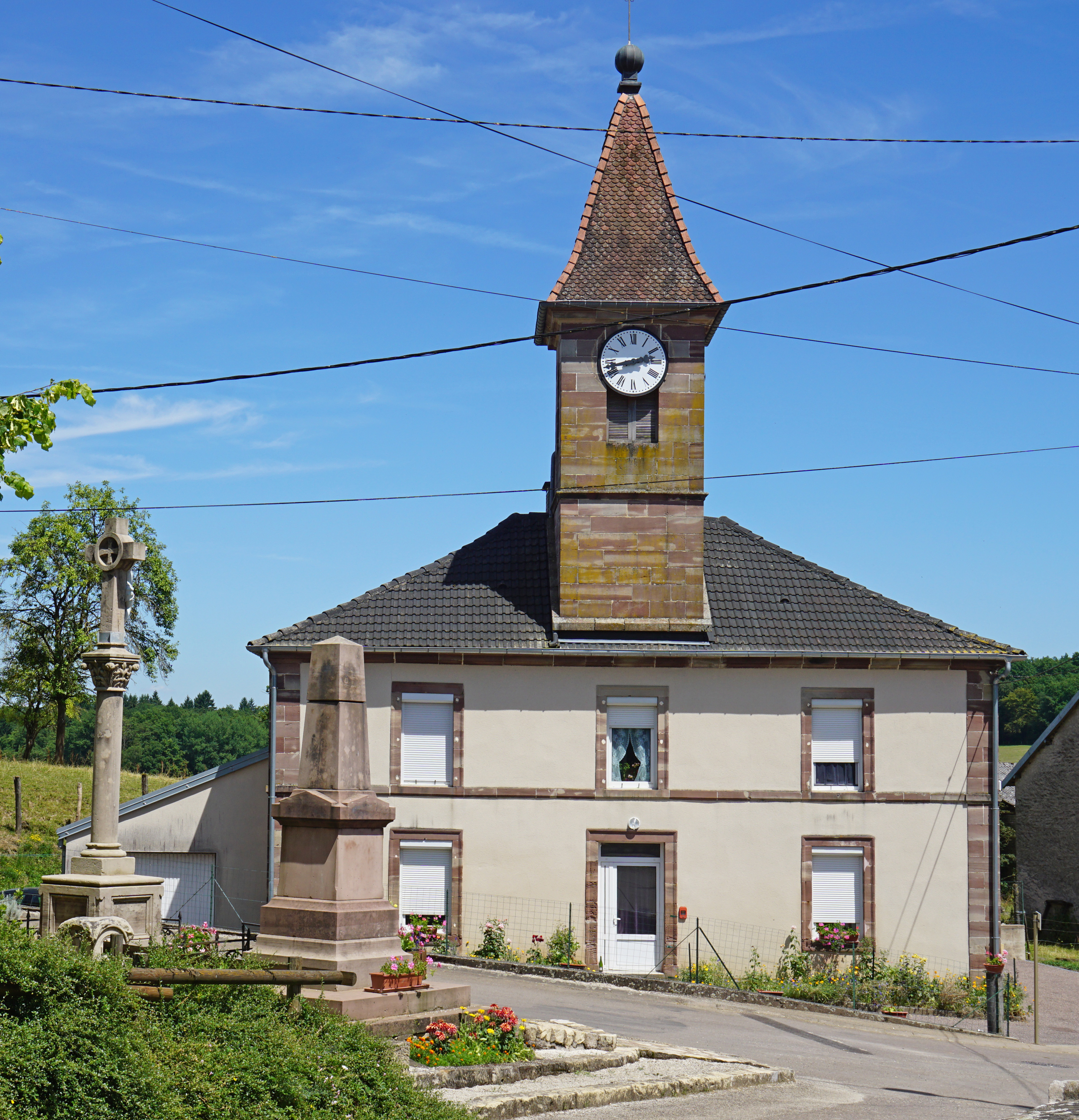 Mairie de Visoncourt.